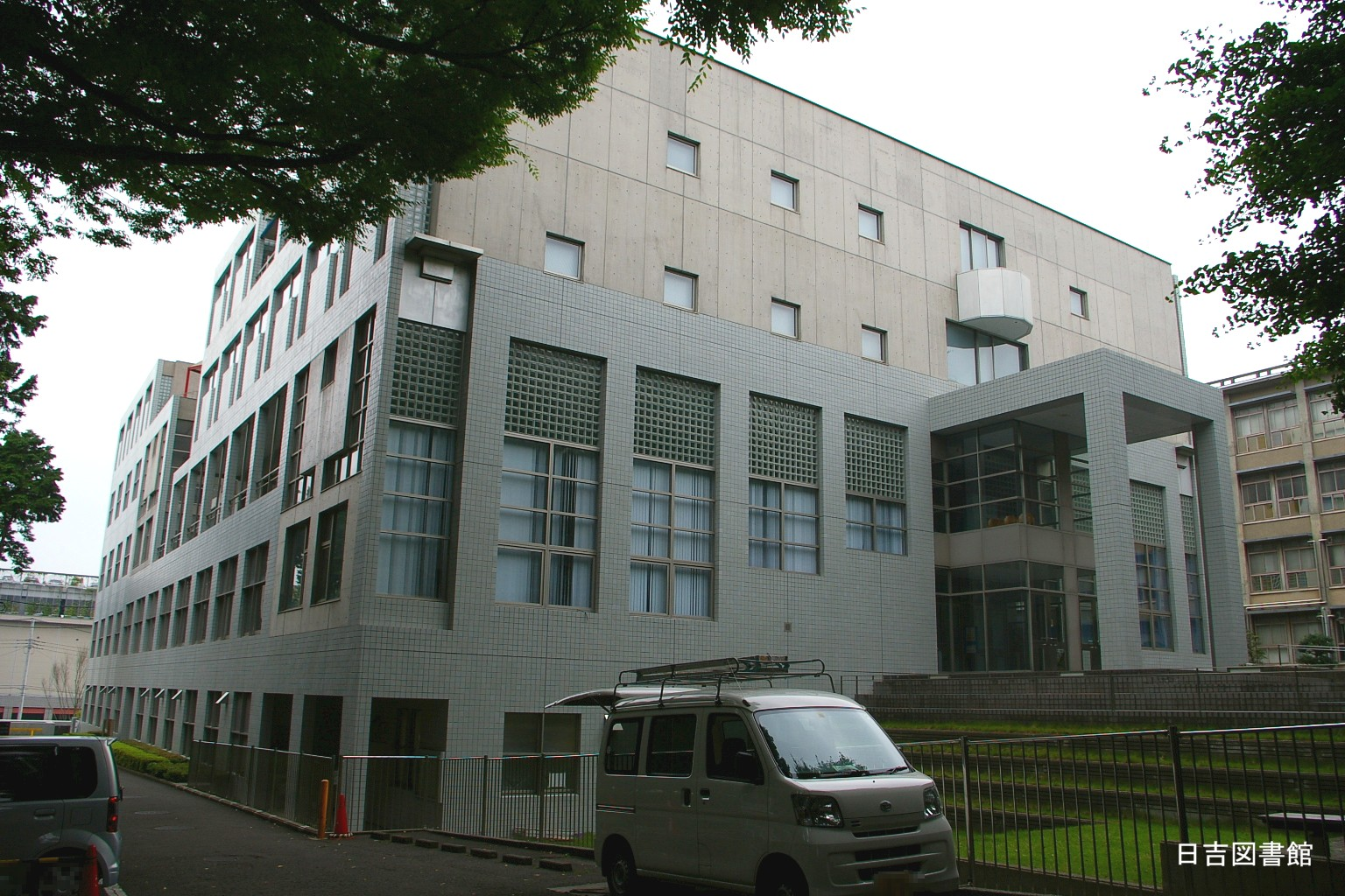 2009.5日本国内で塾生 (talk)が撮影。